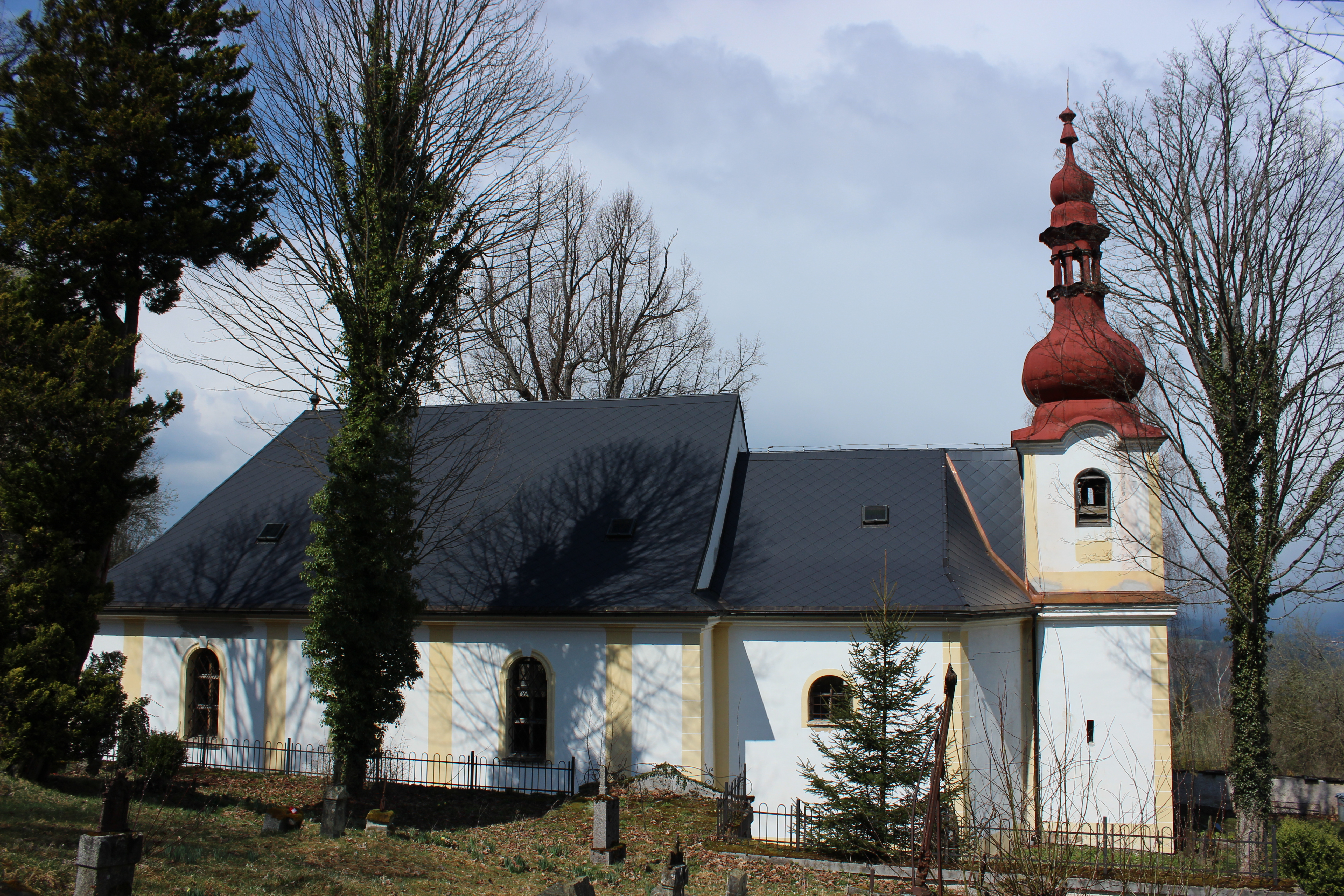 Kostel sv. Vintíře - Dobrá Voda (Hartmanice) - okres Klatovy. Česká republika.